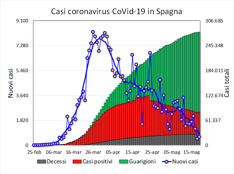 Andamento giornaliero dei casi relativi alla pandemia di COVID-19. Sono evidenziati decessi, guarigioni, casi attivi e nuovi casi giornalieri.